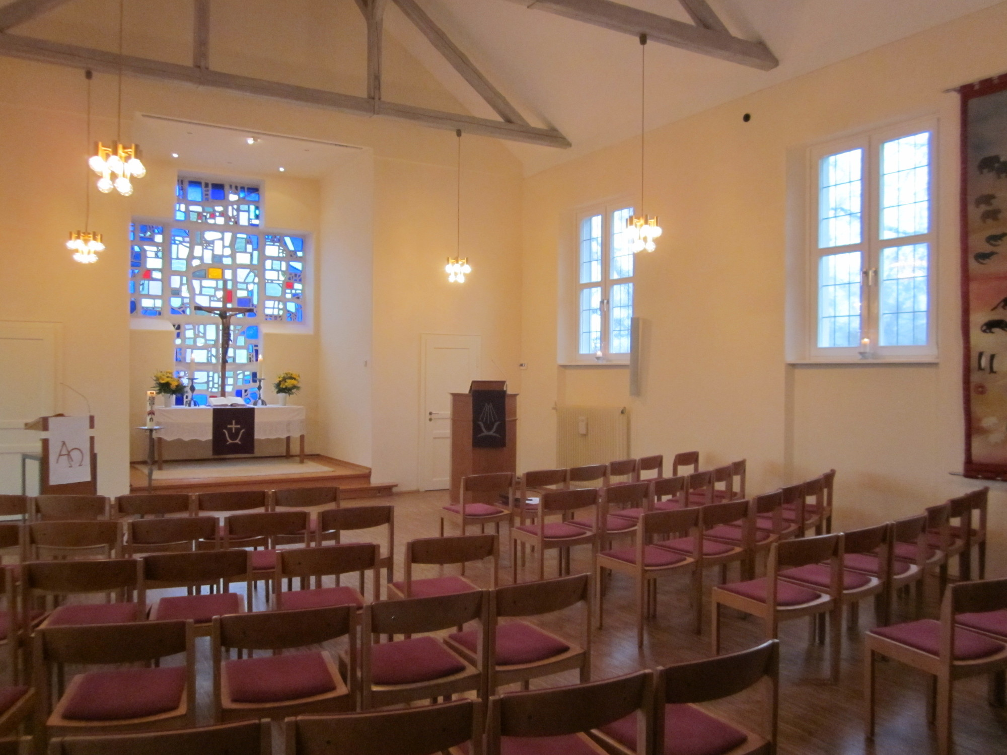 Altarbereich der Friedenskirche Göttingen.